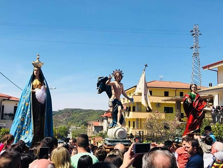 Trittico pasquale Dasà